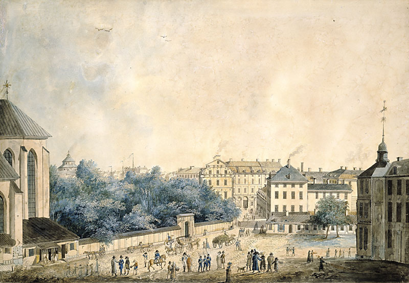 Arsenalsgatan Bildkonst Konstnär: Cederholm, Axel Fredrik Material och teknik: Akvarell Underlag: Papper Mått i mm: 400x560 Nyckelord Plats: Kvarteret LANTMÄTAREN. Kvarteret LÄDERKANONEN. Arsenalsgatan. Hedvig Eleonora kyrka. Jakobs församling. Jakobs kyrka. Karl XII:s Torg. Kungsträdgården. Makalös. Norrmalm. Östermalm. Tid: 1808 Ämne: Byggnader. Folkliv. Kommunikationer. Natur. Kyrkor. Palats. Hästfordon. Parker. Gatumiljöer. Hedvig Eleonora kyrka. Jakobs kyrka. Makalös. Trädgårdar. Referenser Upphov: Cederholm, Axel Fredrik (1780-1828). Tid: 1808 Beteckning: Inventarienummer SSM 9440